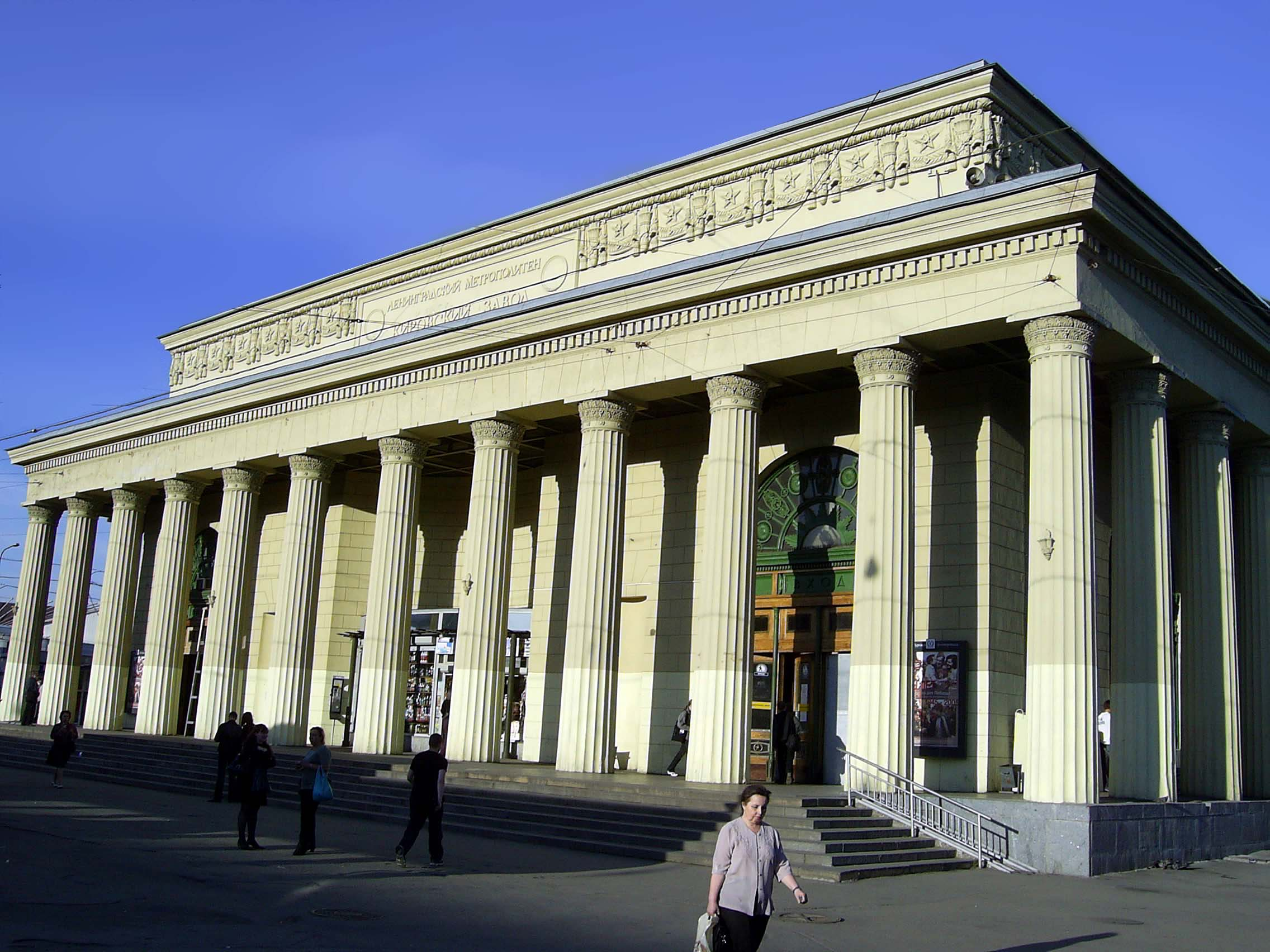 Наземный вестибюль станции метро "Кировский завод"